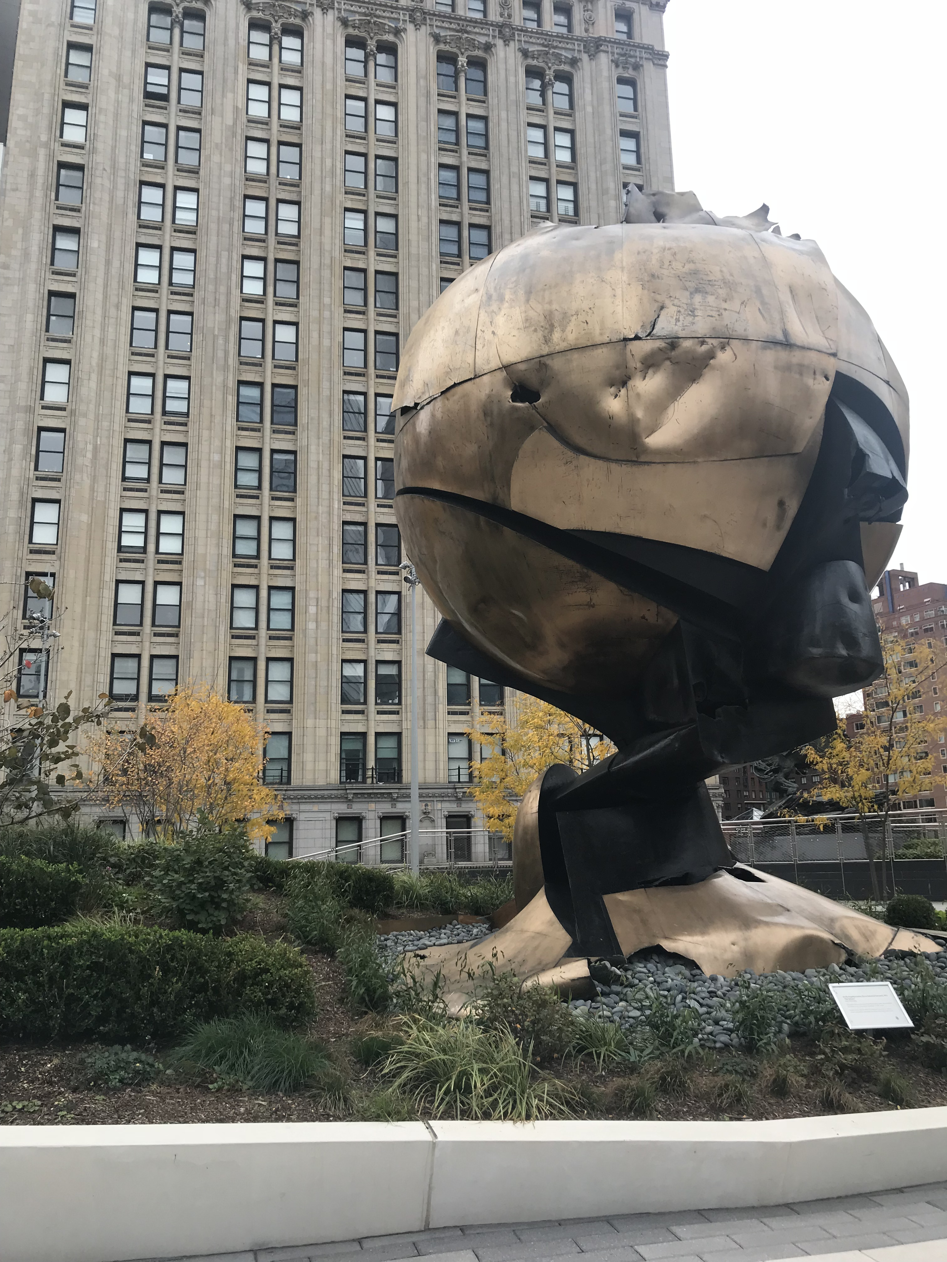 NYC